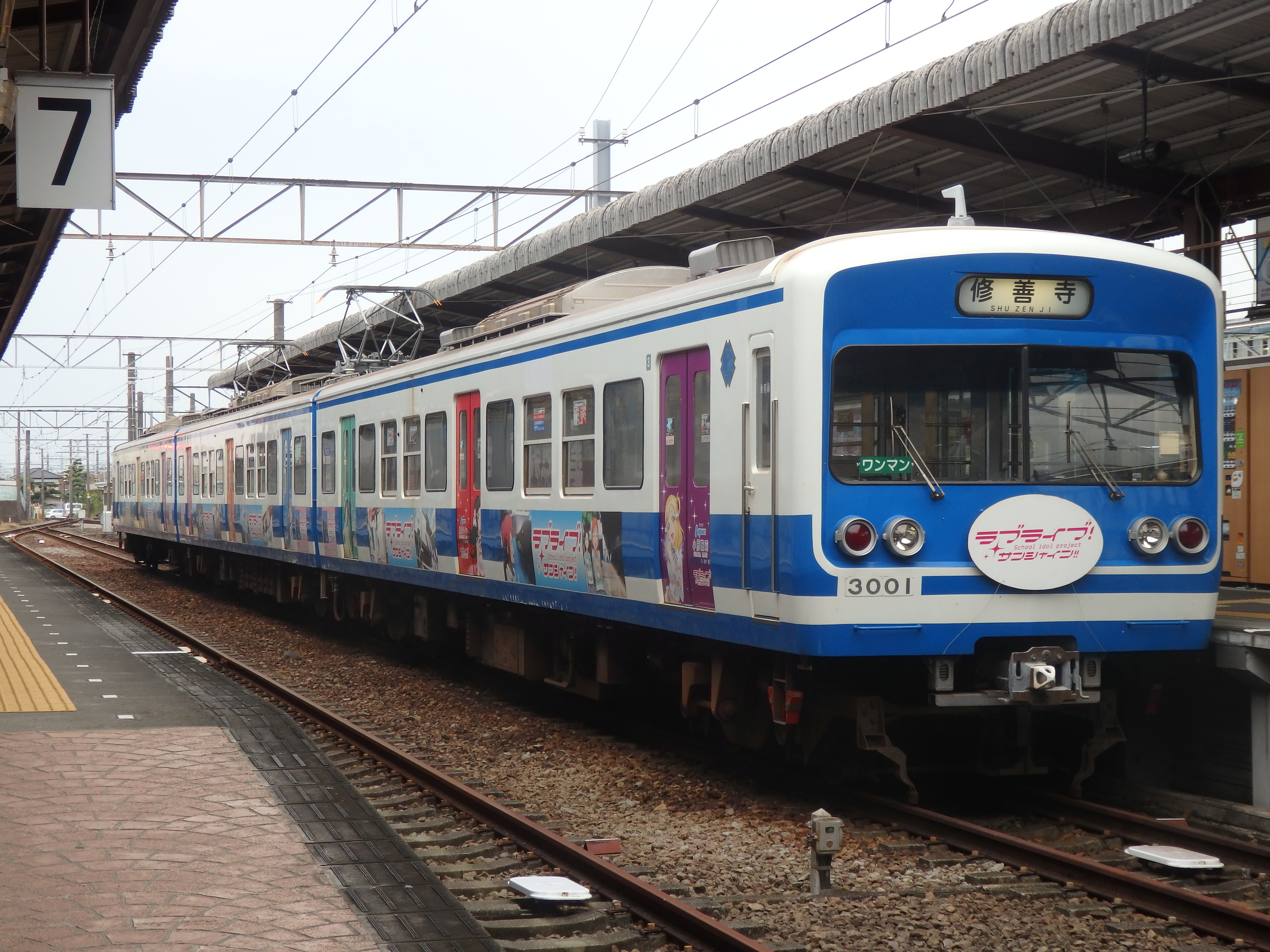 伊豆箱根鉄道3000系ラブライブラッピング仕様車